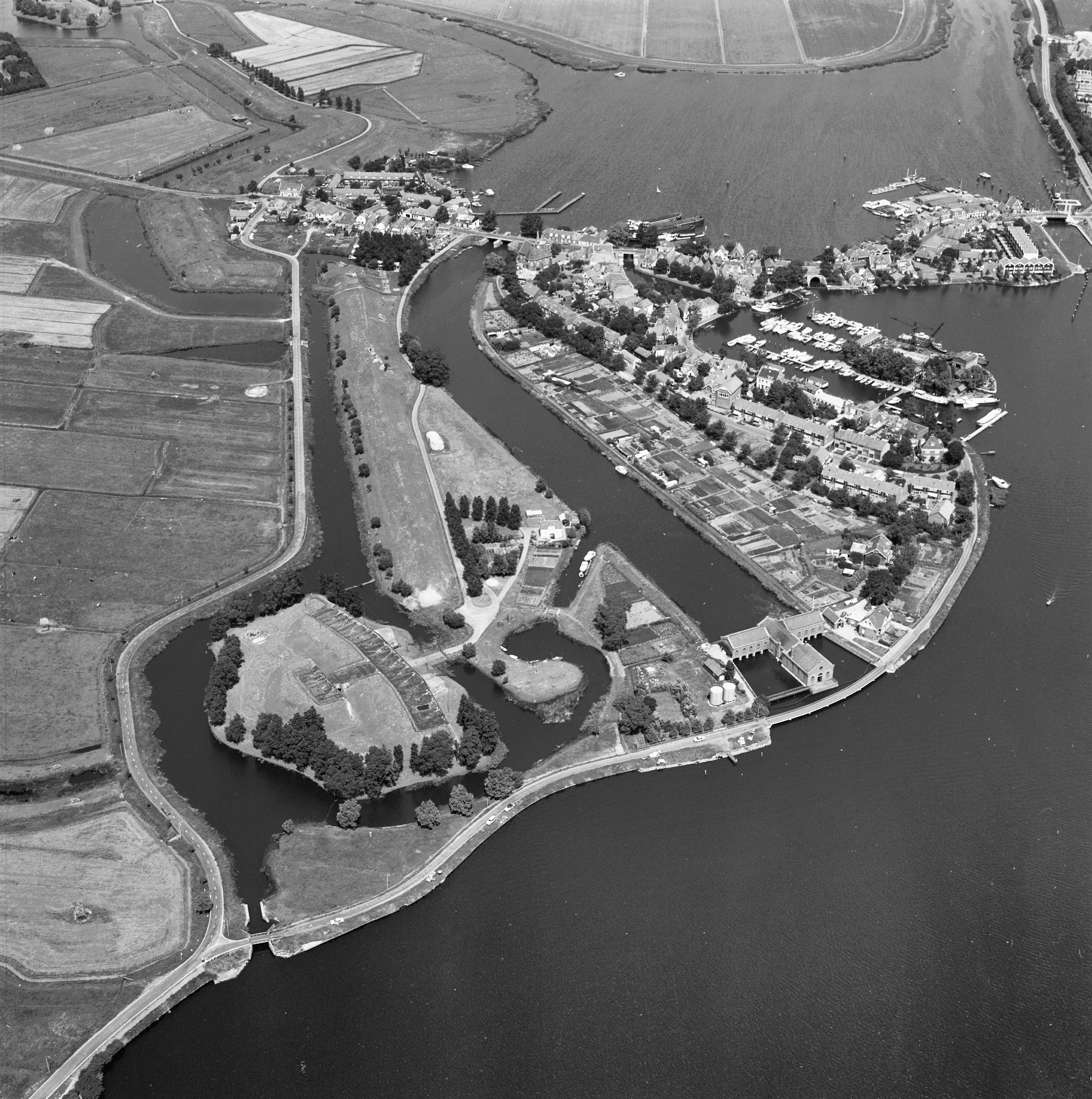 luchtfoto's